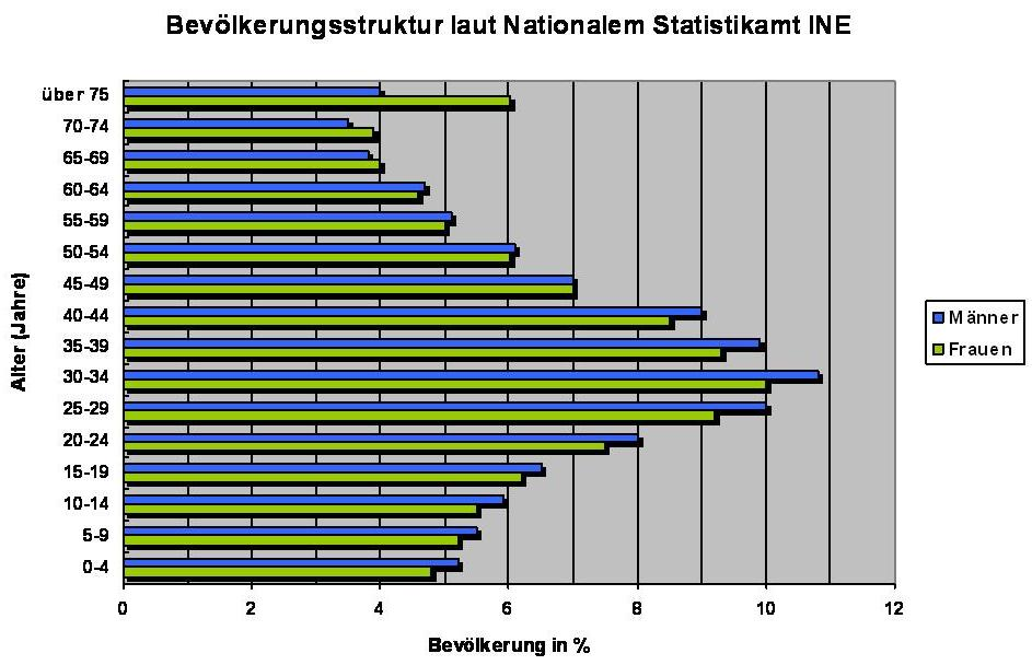 Diagramm Bevölkerungsstruktur Kanarische Inseln